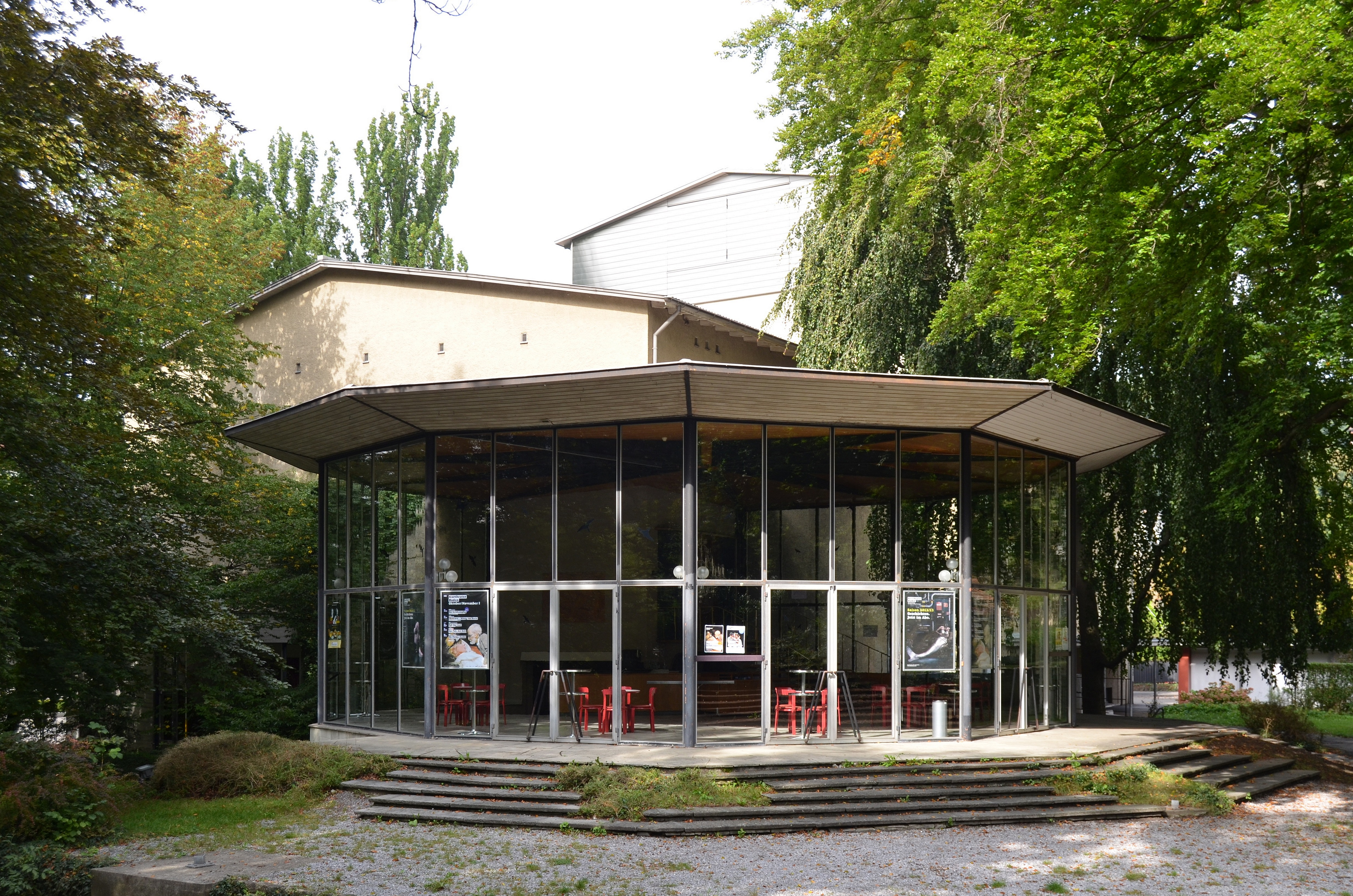 Kurtheater mit Glasfoyer KGS-Nr: 9508